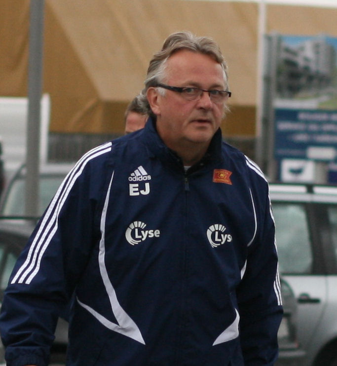 Erik Johannessen